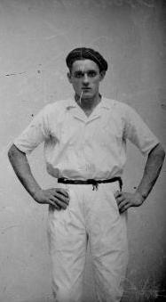 Dionisio Onaindia in 1937